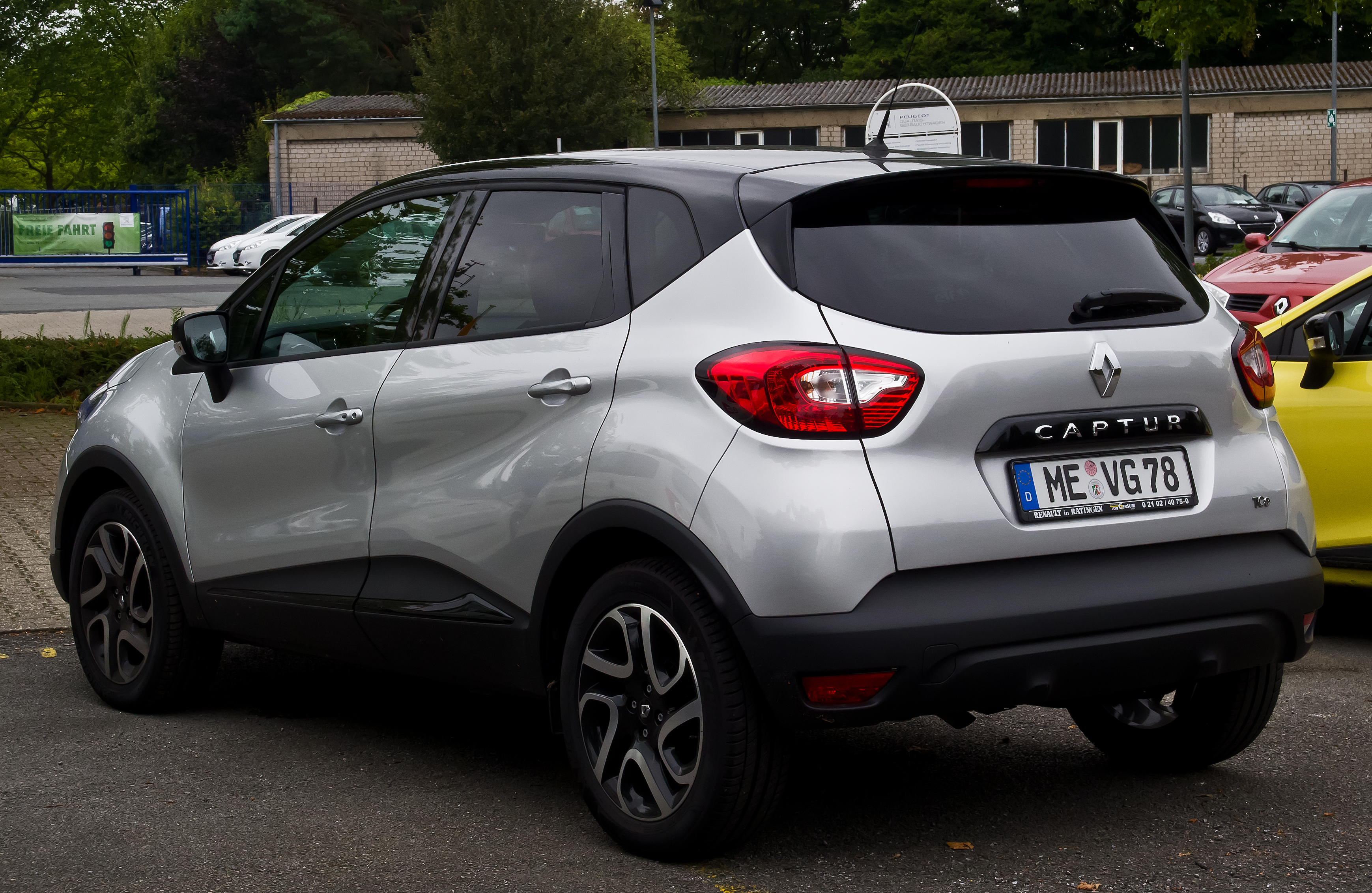 Renault Captur Luxe ENERGY TCe 90 Start & Stop eco²